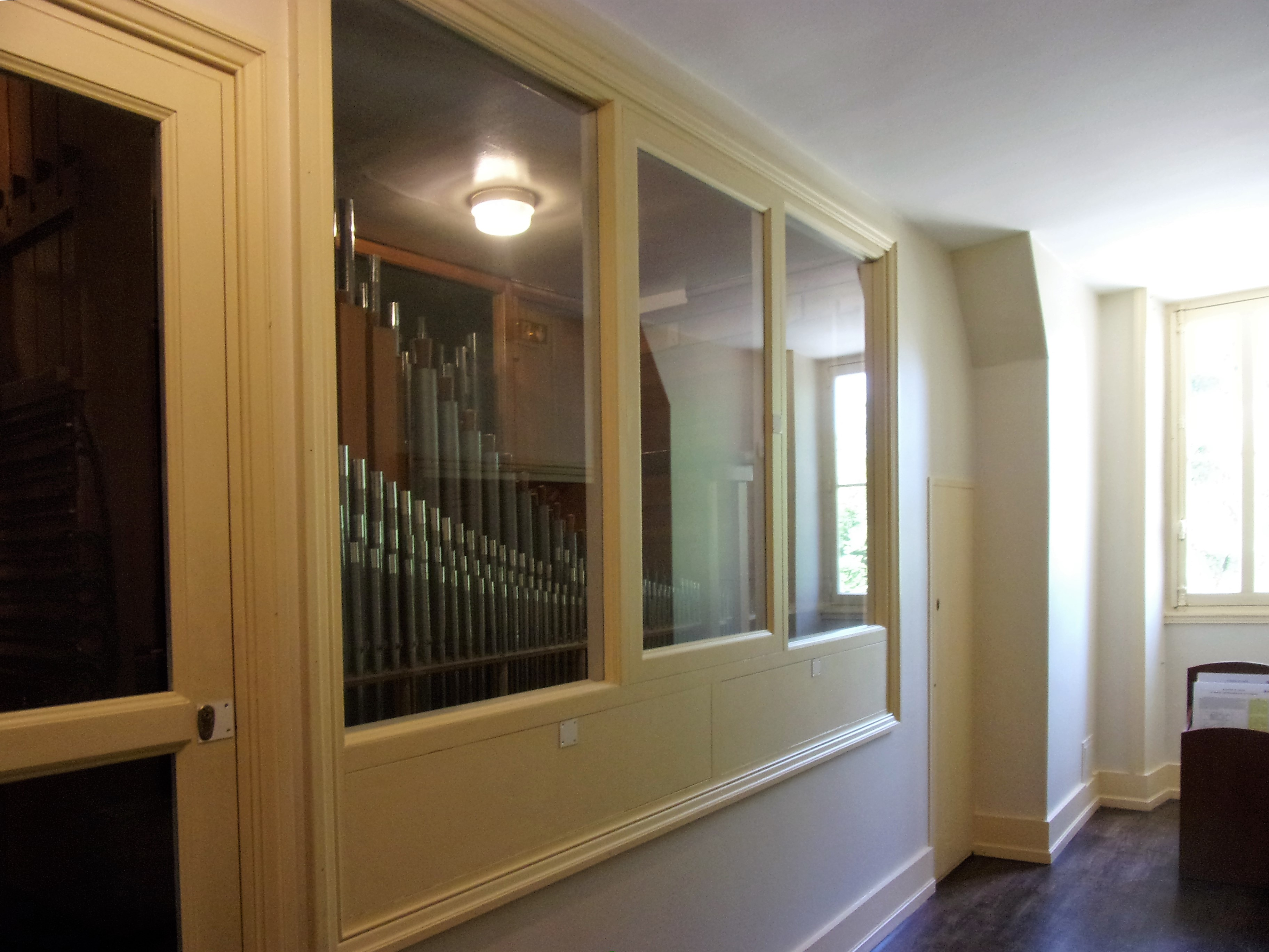 Cloison vitrée permettant de voir le mécanisme de l'orgue du château